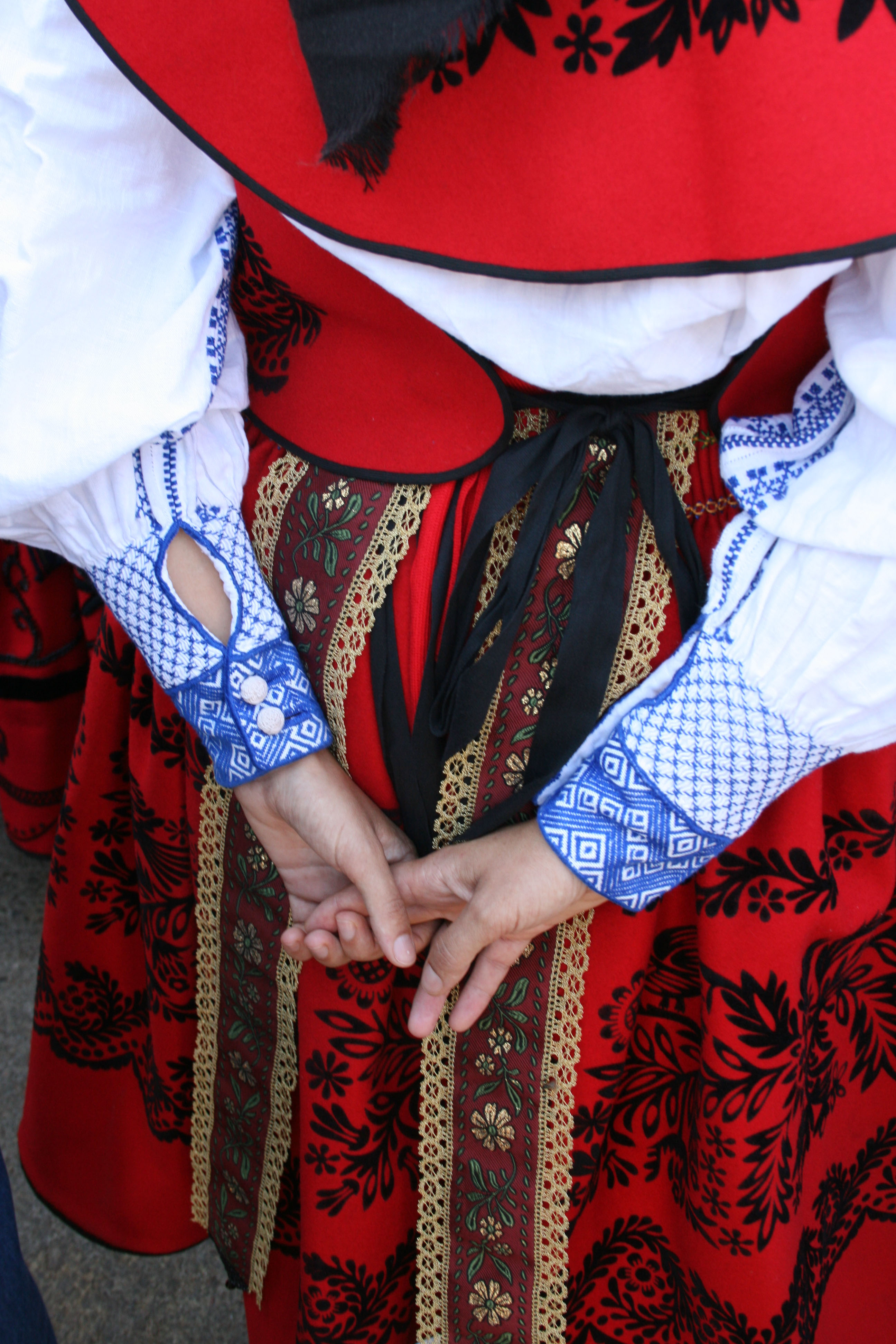 Detalle del bordado de la camisa de un traje regional femenino. Traje regional de Aliste (Zamora)